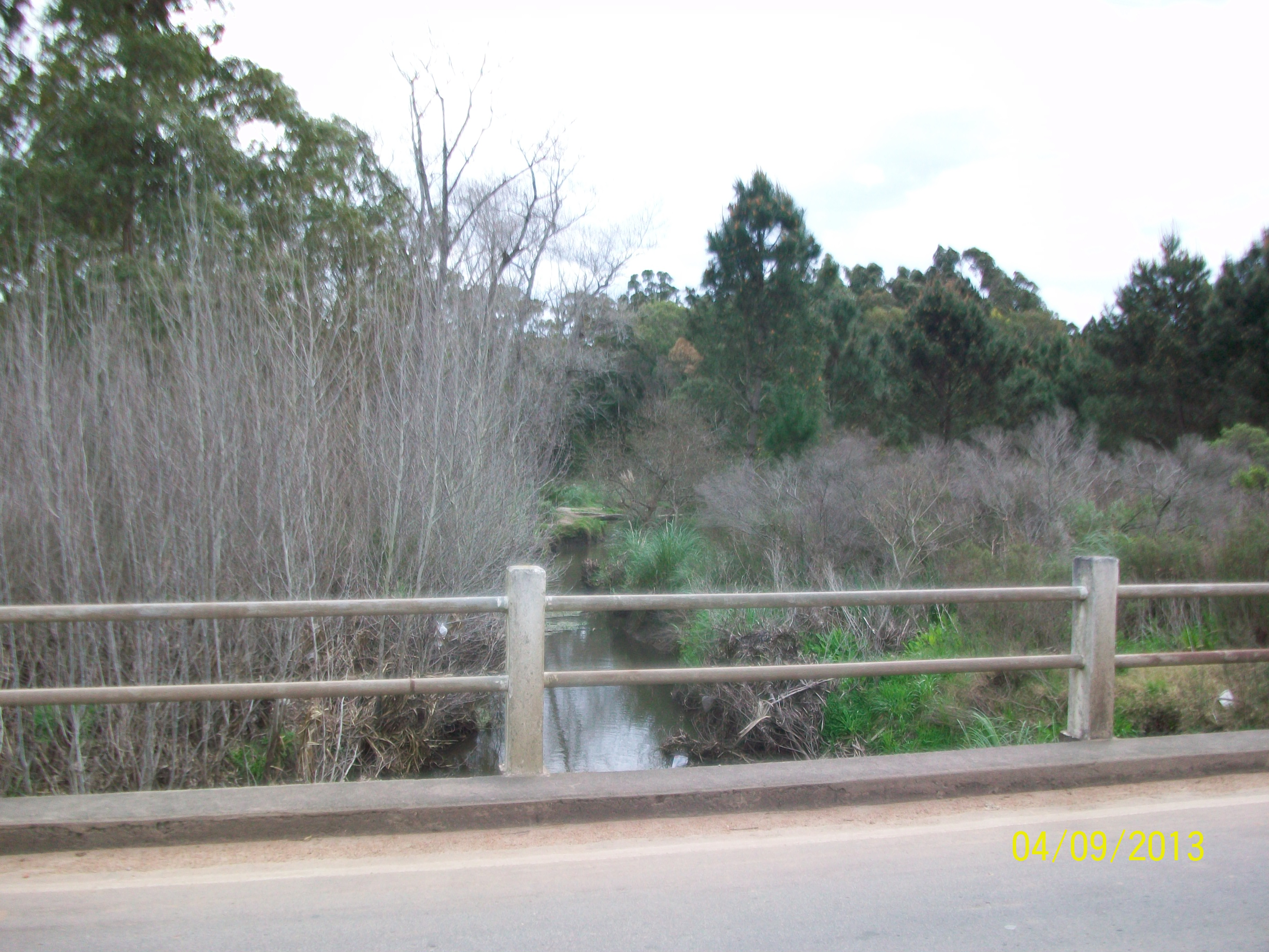 Vista Arroyo Tropa Vieja desde la ruta 87